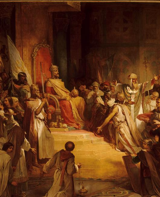 Baudouin IX, comte de Flandre, couronné empereur latin d'Orient à Constantinople sous le nom de Baudouin 1er, après le renversement d'Alexis V Doukas par l'armée croisée franco-vénitienne, 16 mai 1204